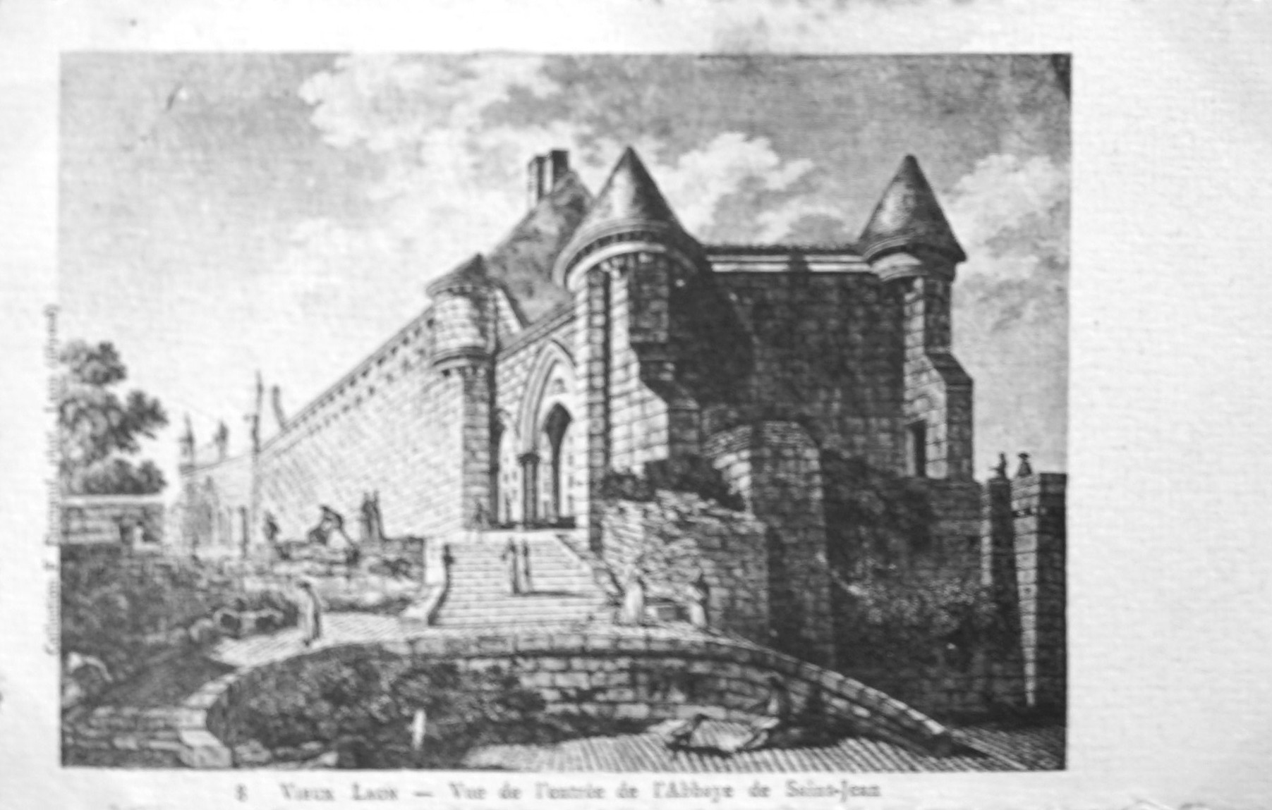 sur une vue ancienne.